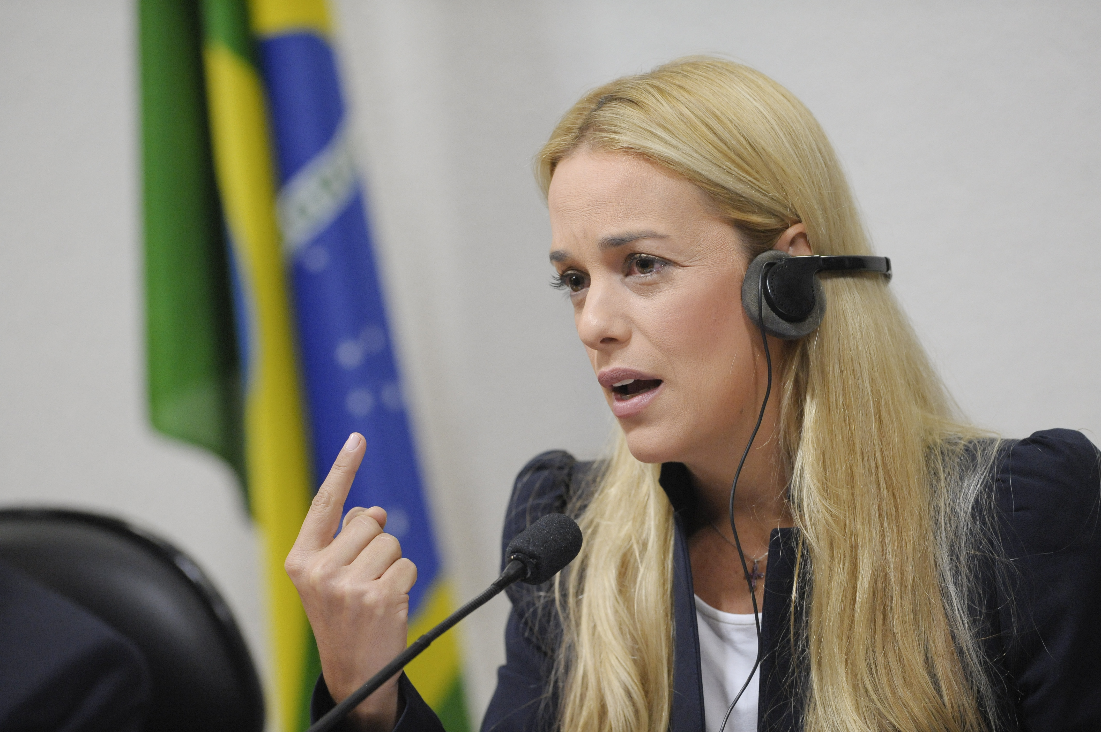 Sala de comissões do Senado durante a Comissão de Relações Exteriores e Defesa Nacional que realiza audiência pública interativa para tratar da situação política da Venezuela, que culminou com violações de direitos humanos e a prisão política de políticos oposicionistas ao governo nacional. Em pronunciamento, Lilian Tintori de Lopez. Foto: Pedro França/Agência Senado